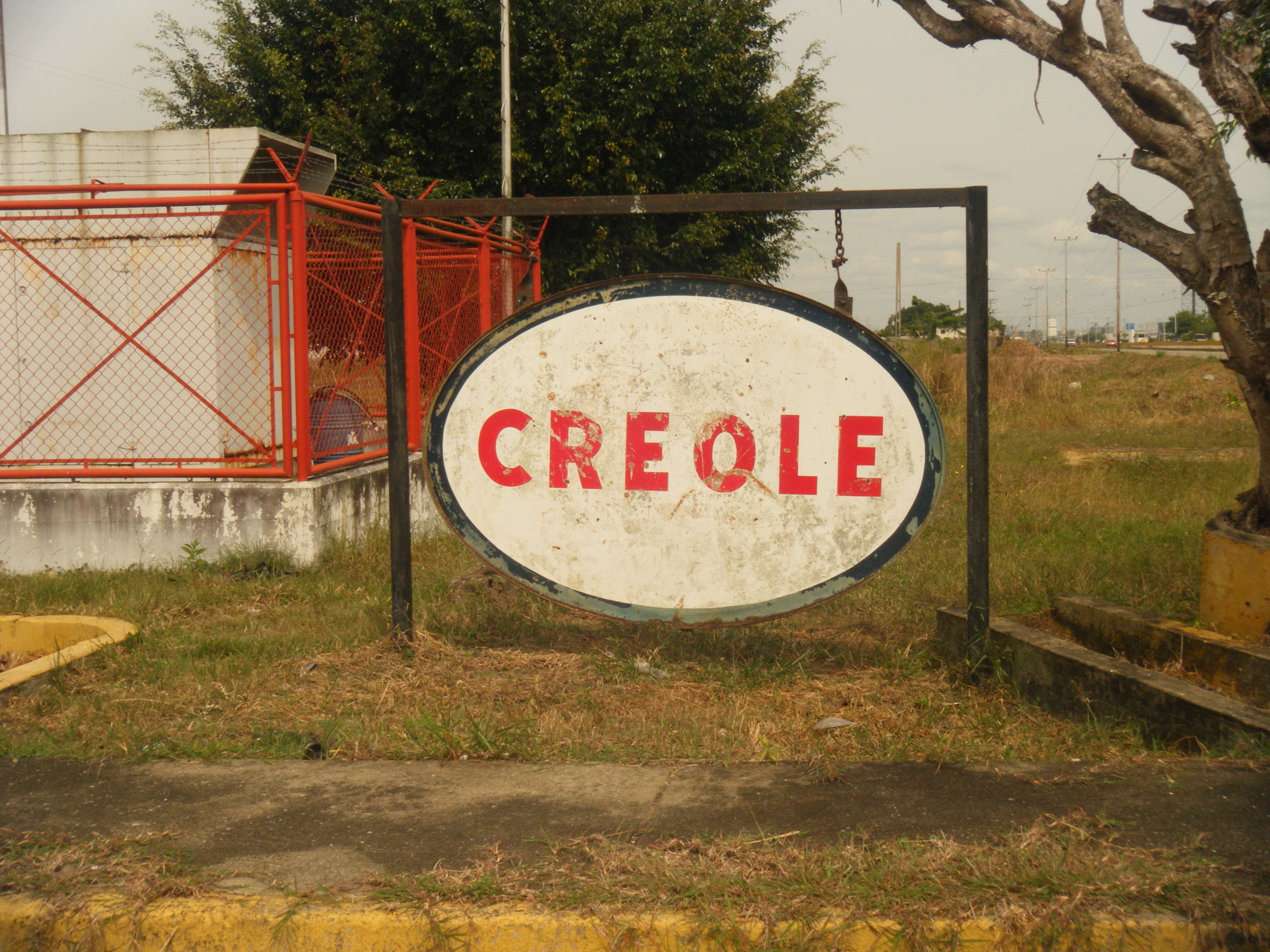 Letrero de Creole. San Vicente, Monagas, Venezuela.